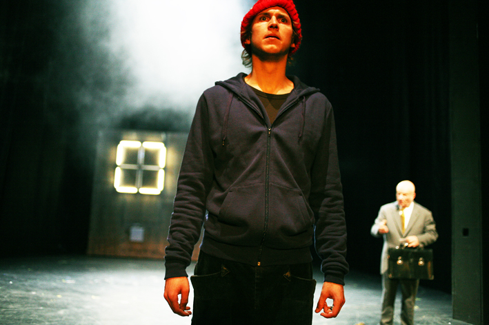 Timm Thaler oder das verkaufte Lachen, Regie: Grazyna Kania, Theater an der Parkaue Berlin